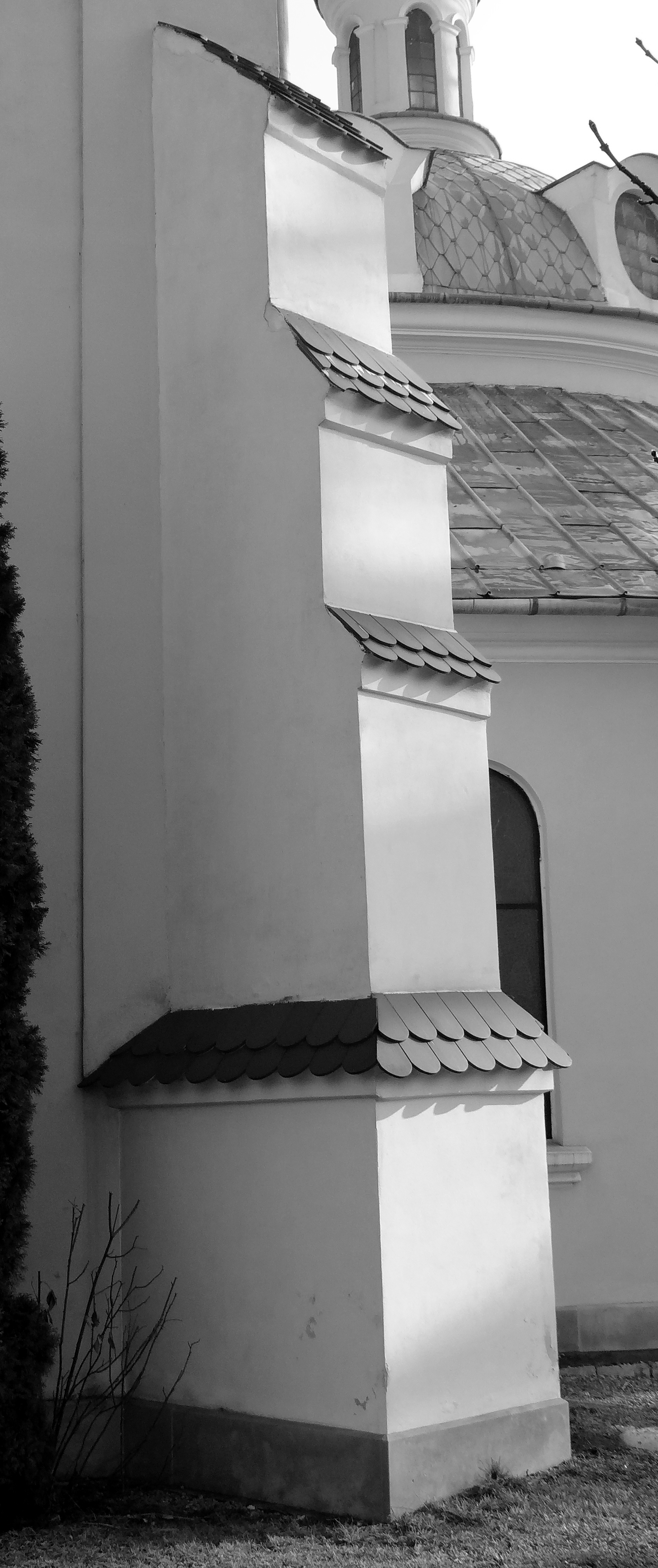 Uskoki przypory nakryte kapnikami. Kościół w Hebdowie.